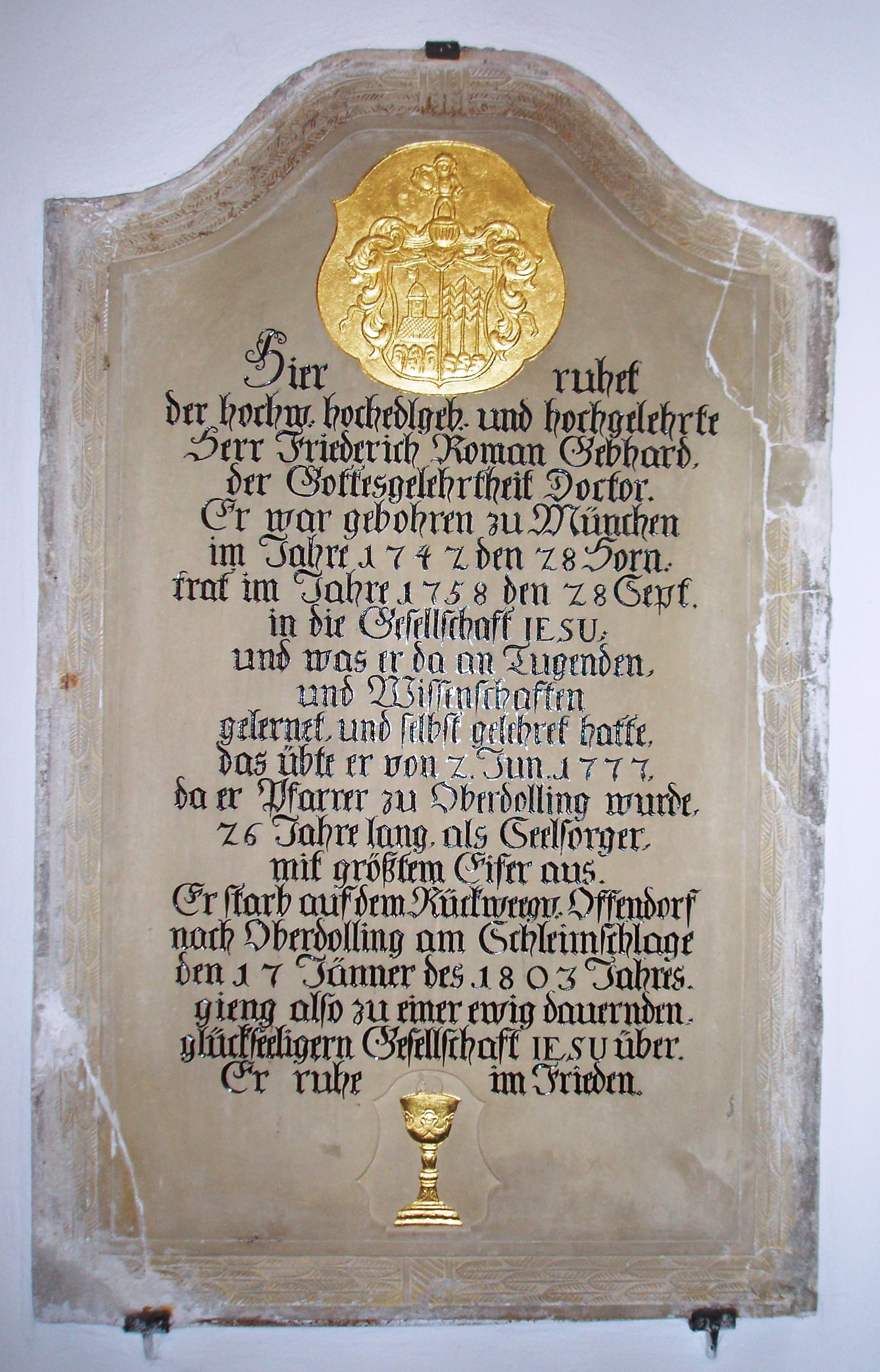 Friedrich_Roman_Gebhard,_Jesuit,_Grabdenkmal_in_der_Kirche_von_Oberdolling,_Landkreis_Eichstätt